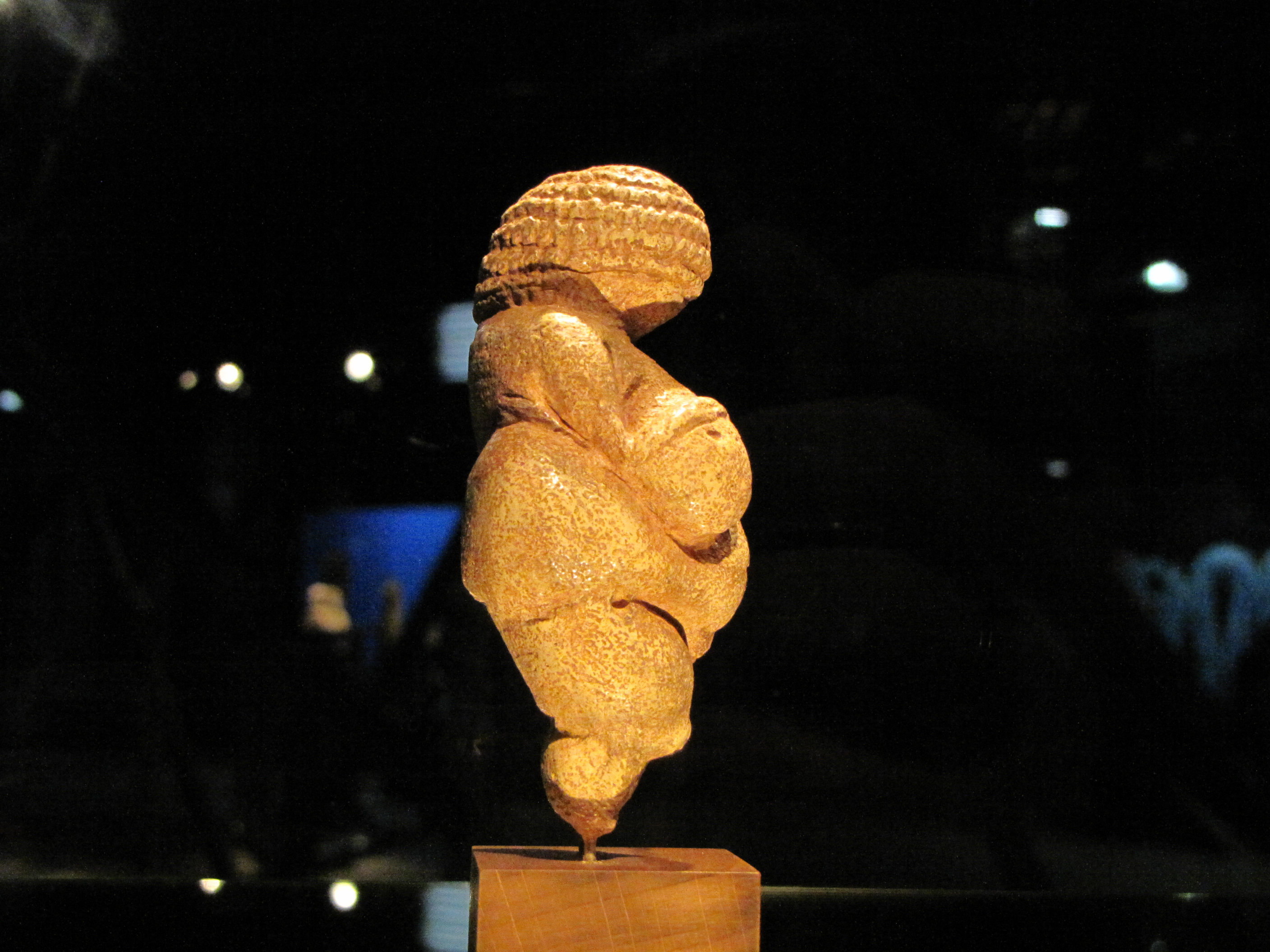 Gasometer Oberhausen. Ausstellung "Magische Orte", 2011. Venus von Willendorf. Kalkstein, 25.000 vor Christus.